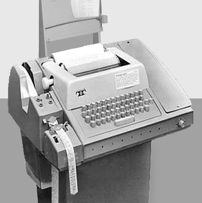 Stroj na přípravu děrných pásek se zdrojovými texty programů pro počítač Gier